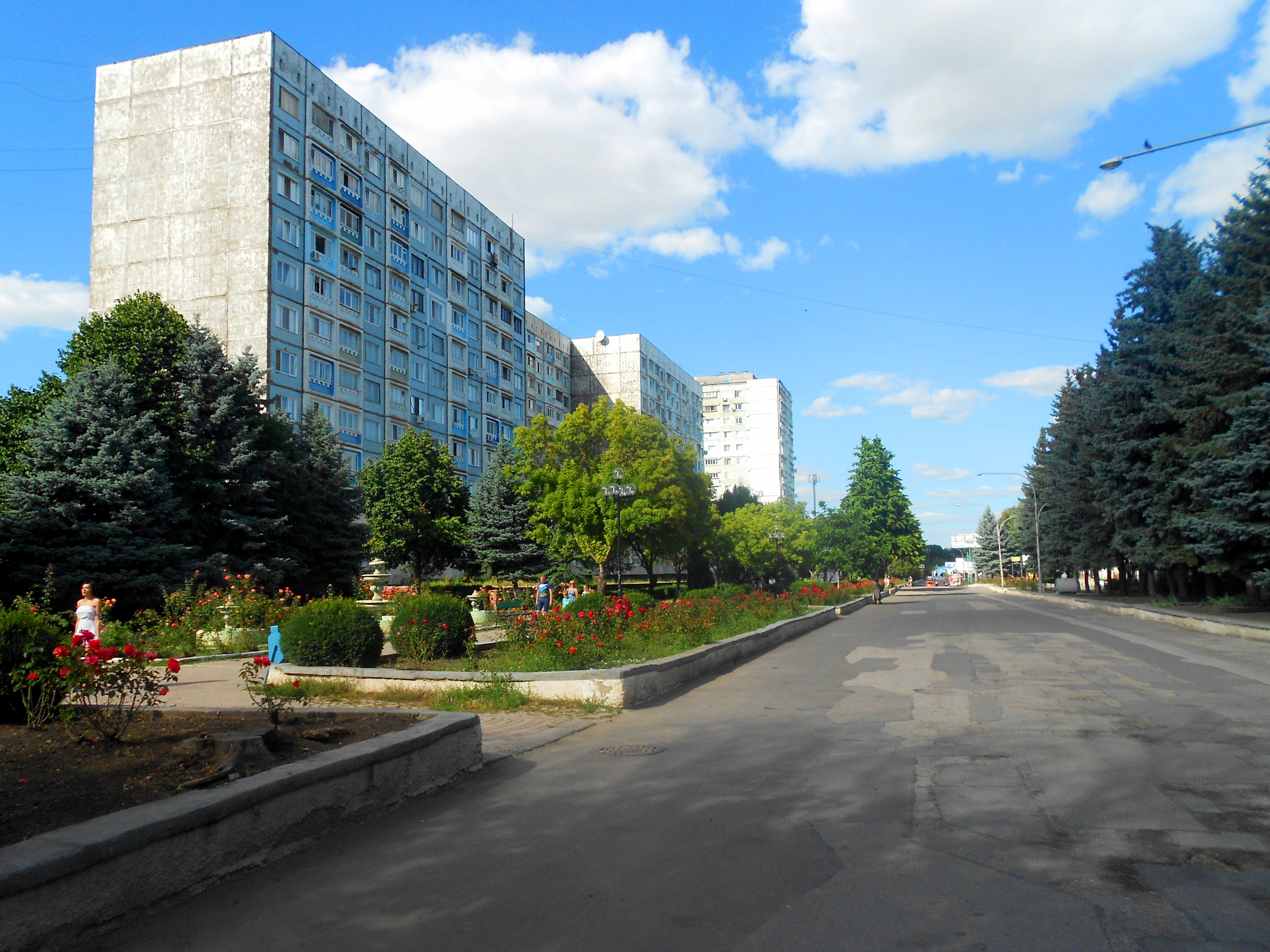 Strada Independenței din Bălți